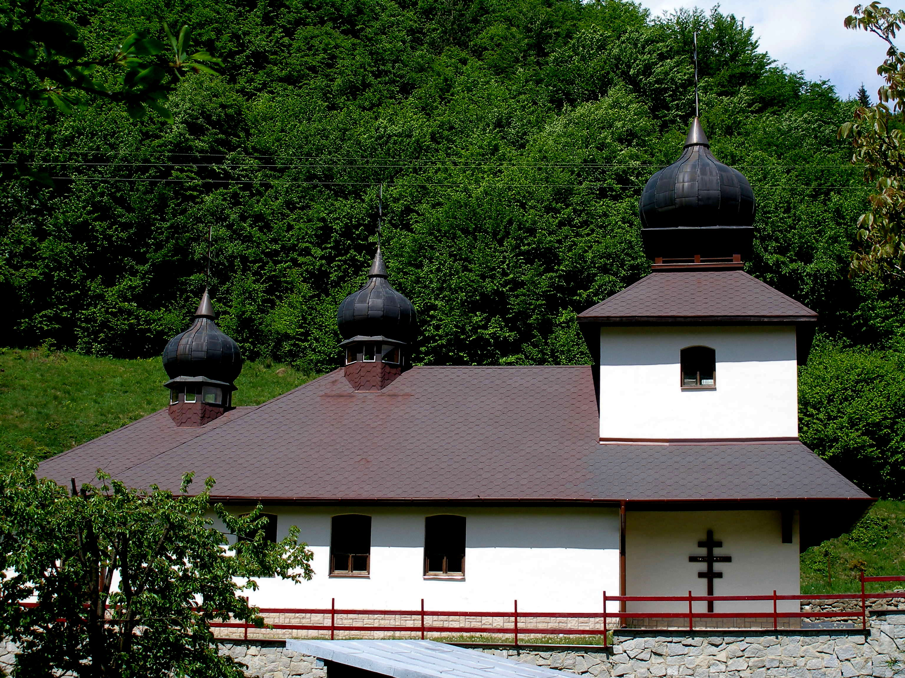 Obec Olejníkov okres Sabinov.